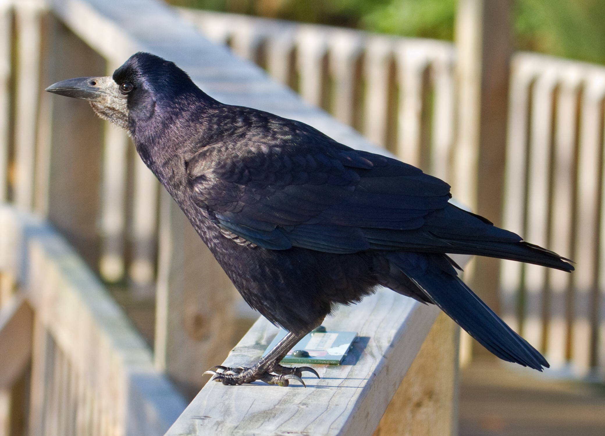 Rook 4